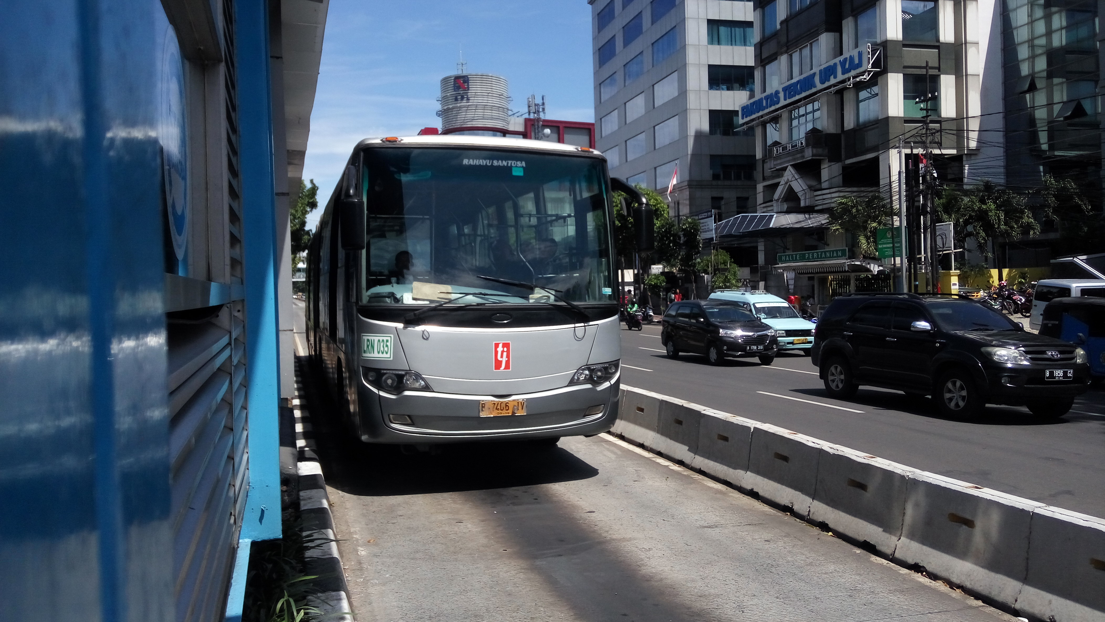 Bus buatan PT AAI milik PT Eka Sari Lorena